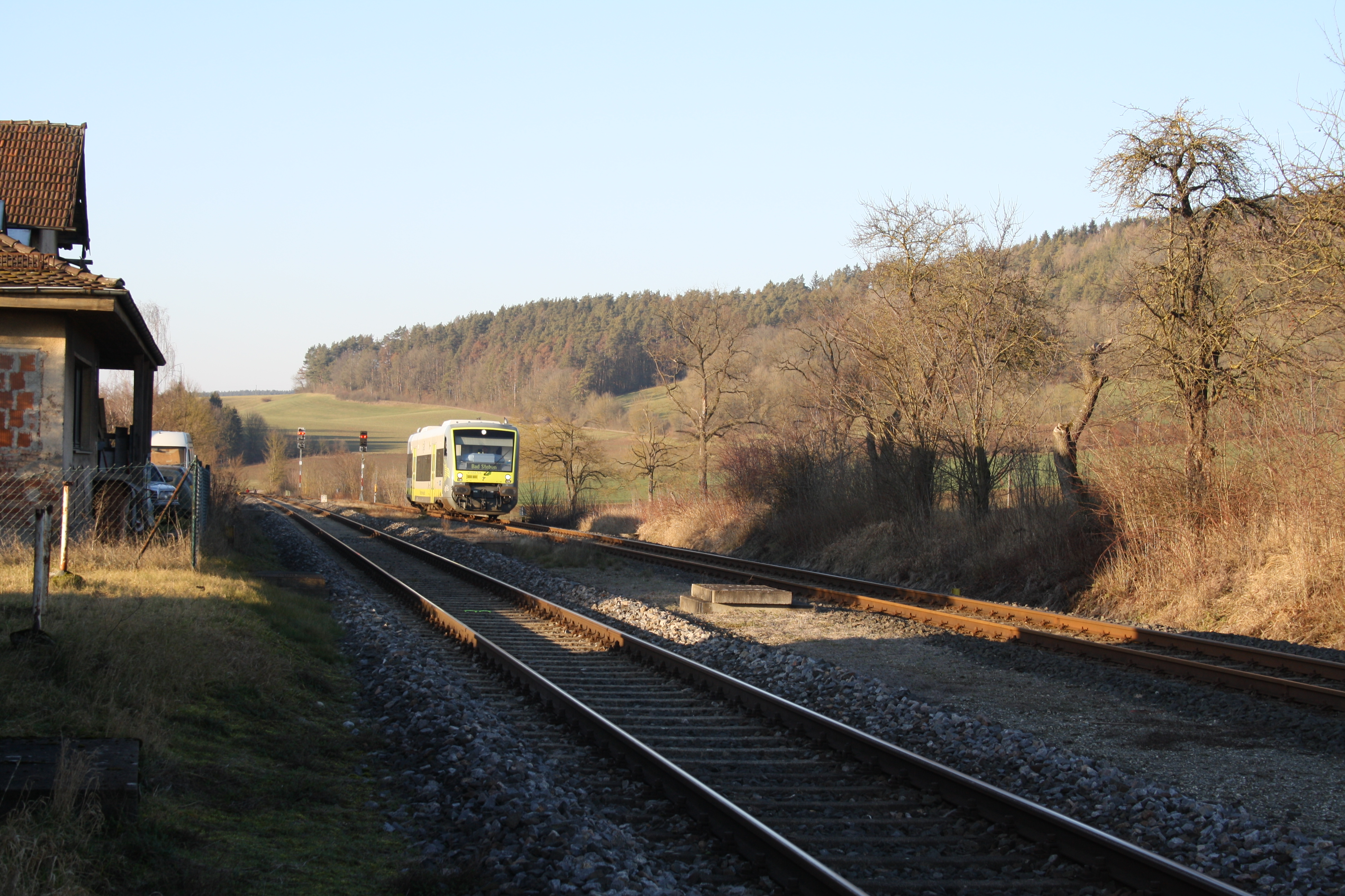 Bahnhof Stockau, links das alte Bahnhofsgebäude